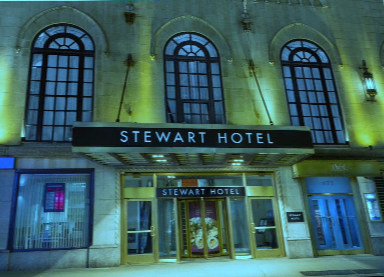 Hotel Stewart Manhattan